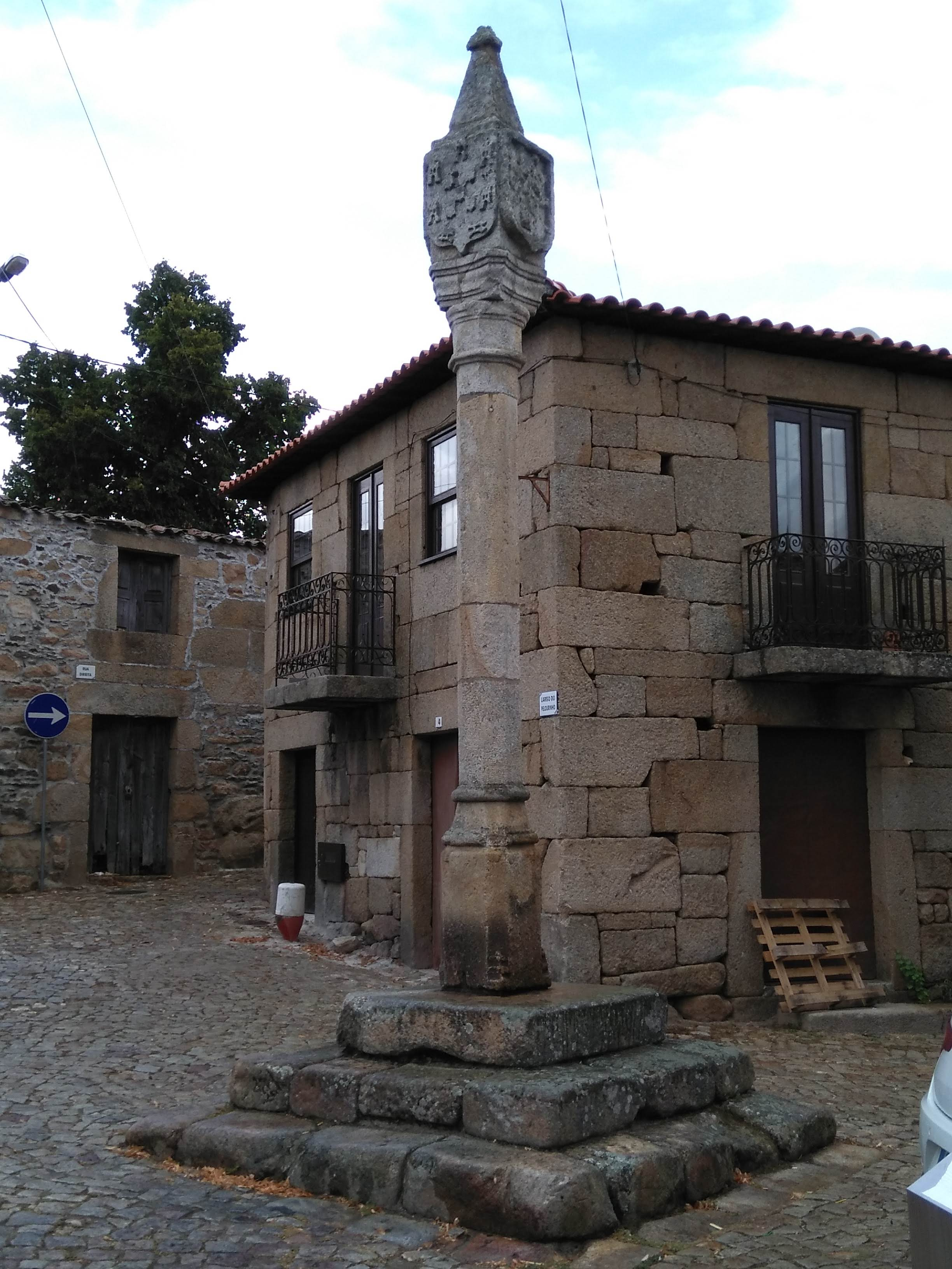 Pelourinho de Abreiro - pelourinho em Mirandela, Portugal Cultural property Pelourinho de Abreiro, Abreiro, Mirandela, Bragança District, Portugal Q10348040, SIPA ID: 823, DGPC ID: 72969 Wiki Loves Monuments ID: DGPC-72969